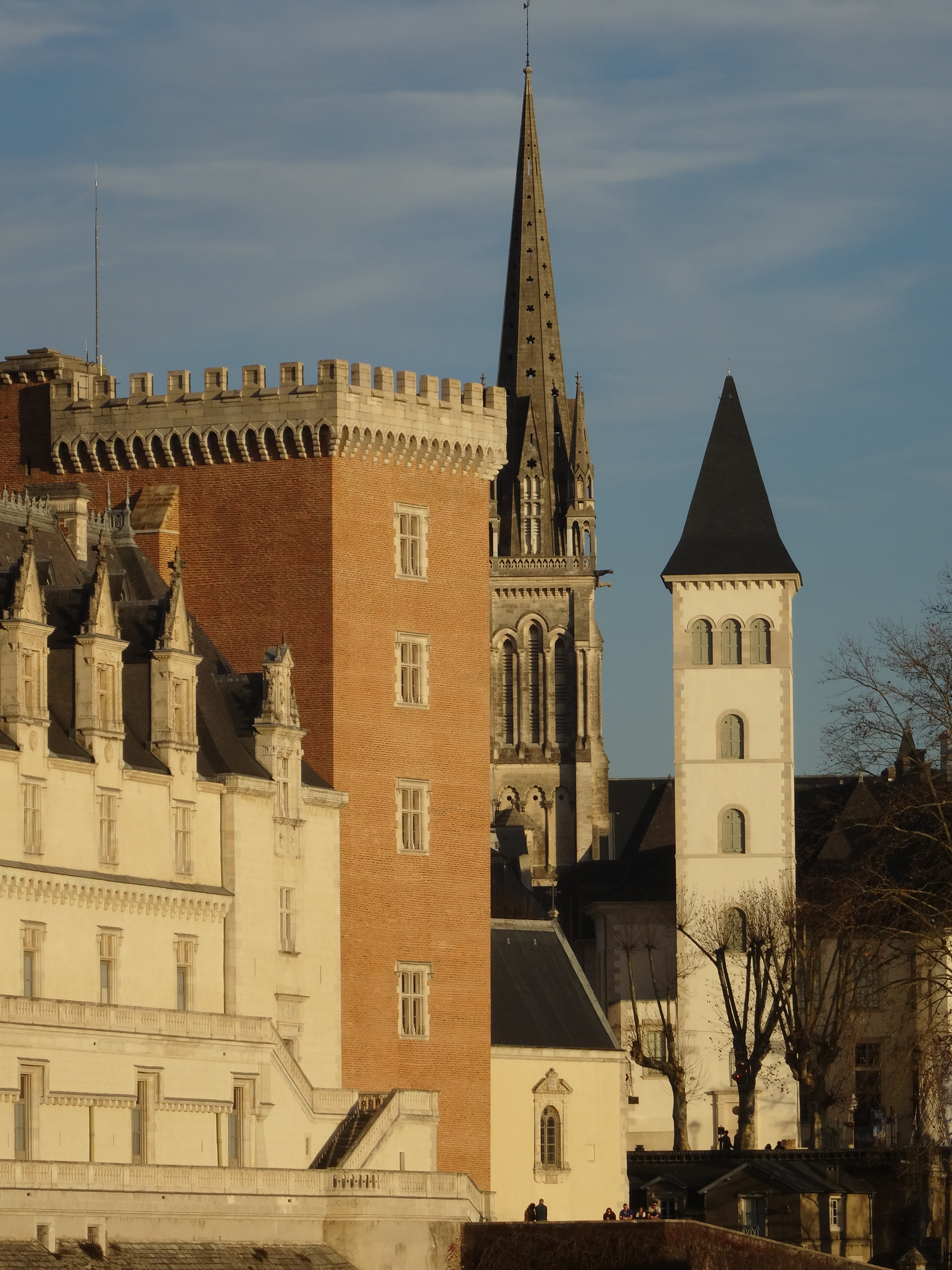 Vue sur le château, l'église Saint-Martin et le parlement à Pau